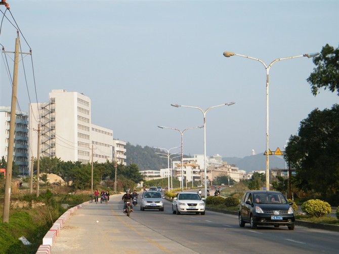 茂洲北、金中南校段磊广路